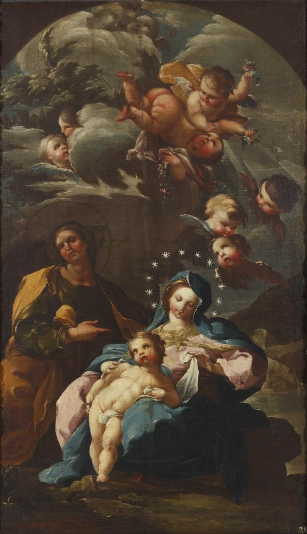 La obra representa a la Virgen María y al Niño Jesús junto a Santa Ana.